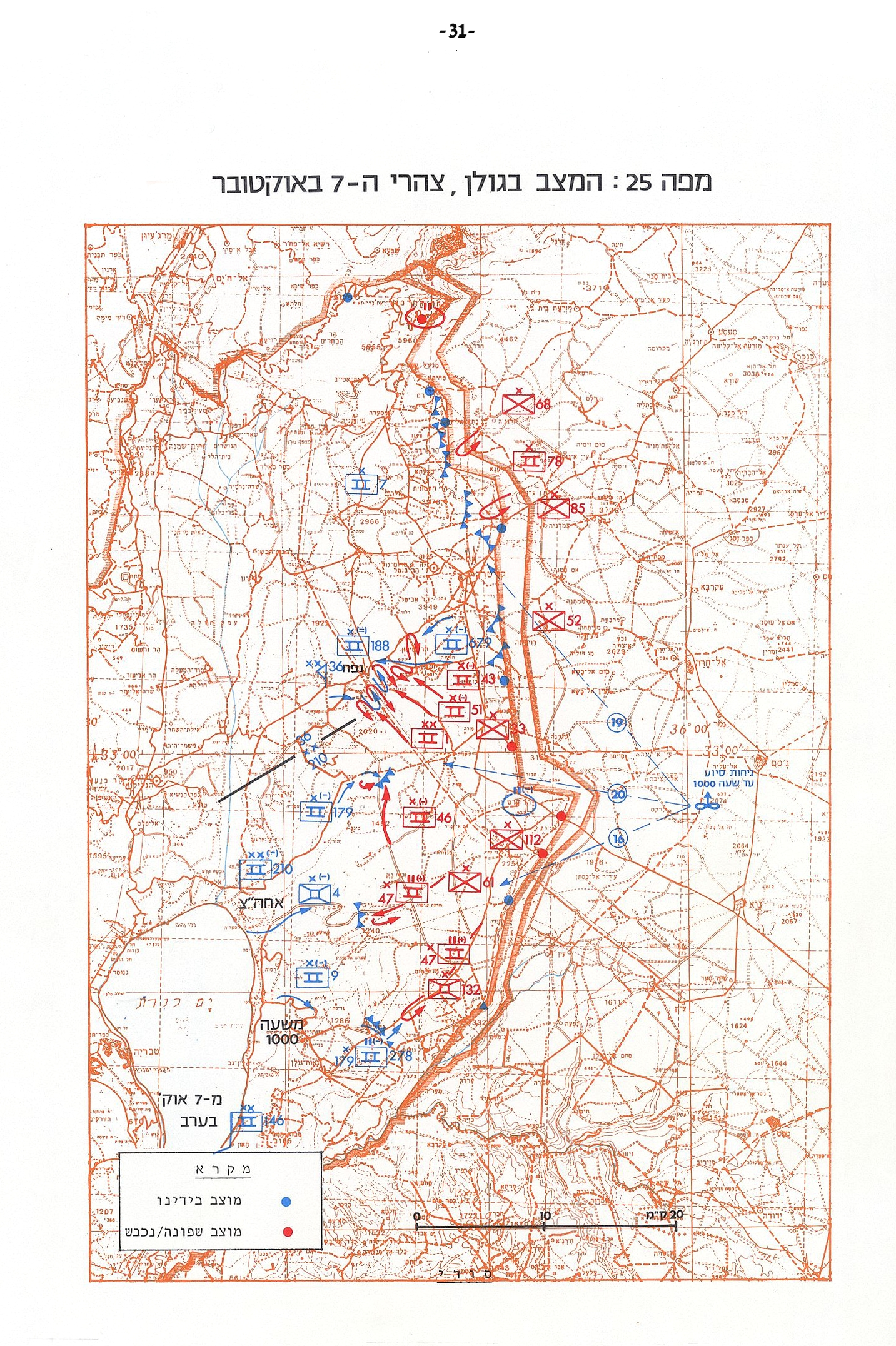 מפה 25 - המצב בגולן, צהרי ה-7 לאוקטובר - מלחמת יום הכיפורים